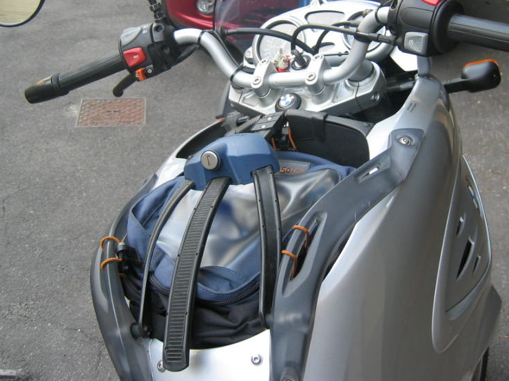 BMW F650 CS storage bag.